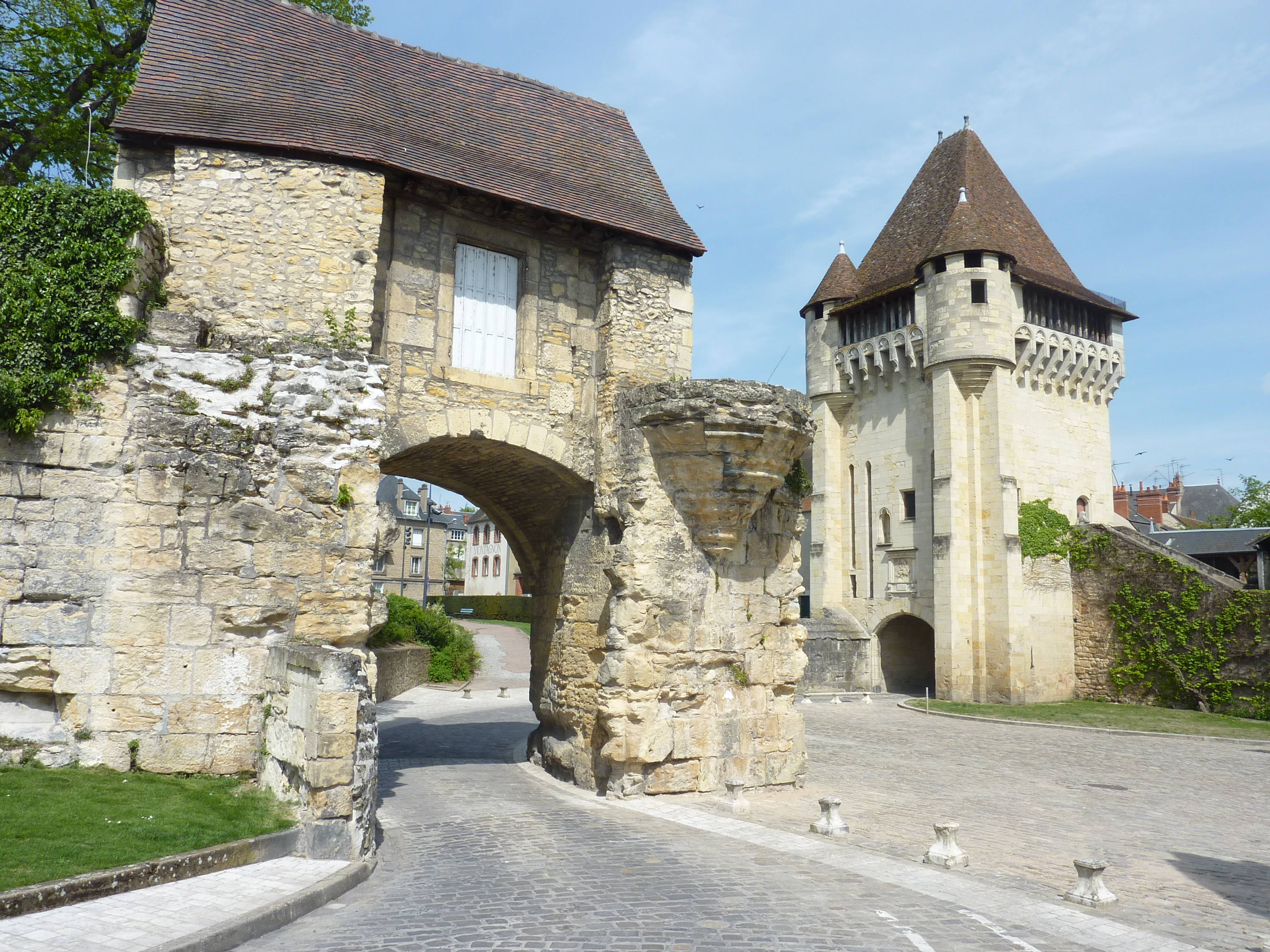 Nevers : la Porte du Croux et les remparts